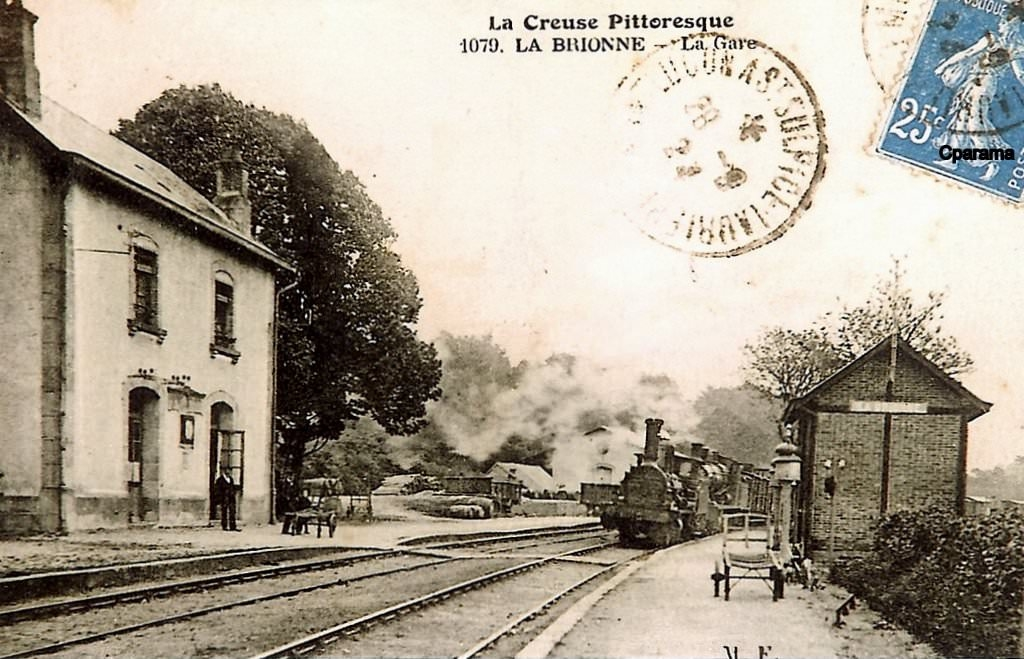 La gare vers 1920.